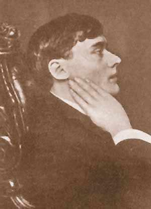 Курдюмов, Валериан Иванович